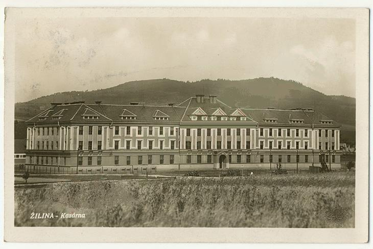 k.u.k. Jäger-Kaserne in Zilina in Slovakia